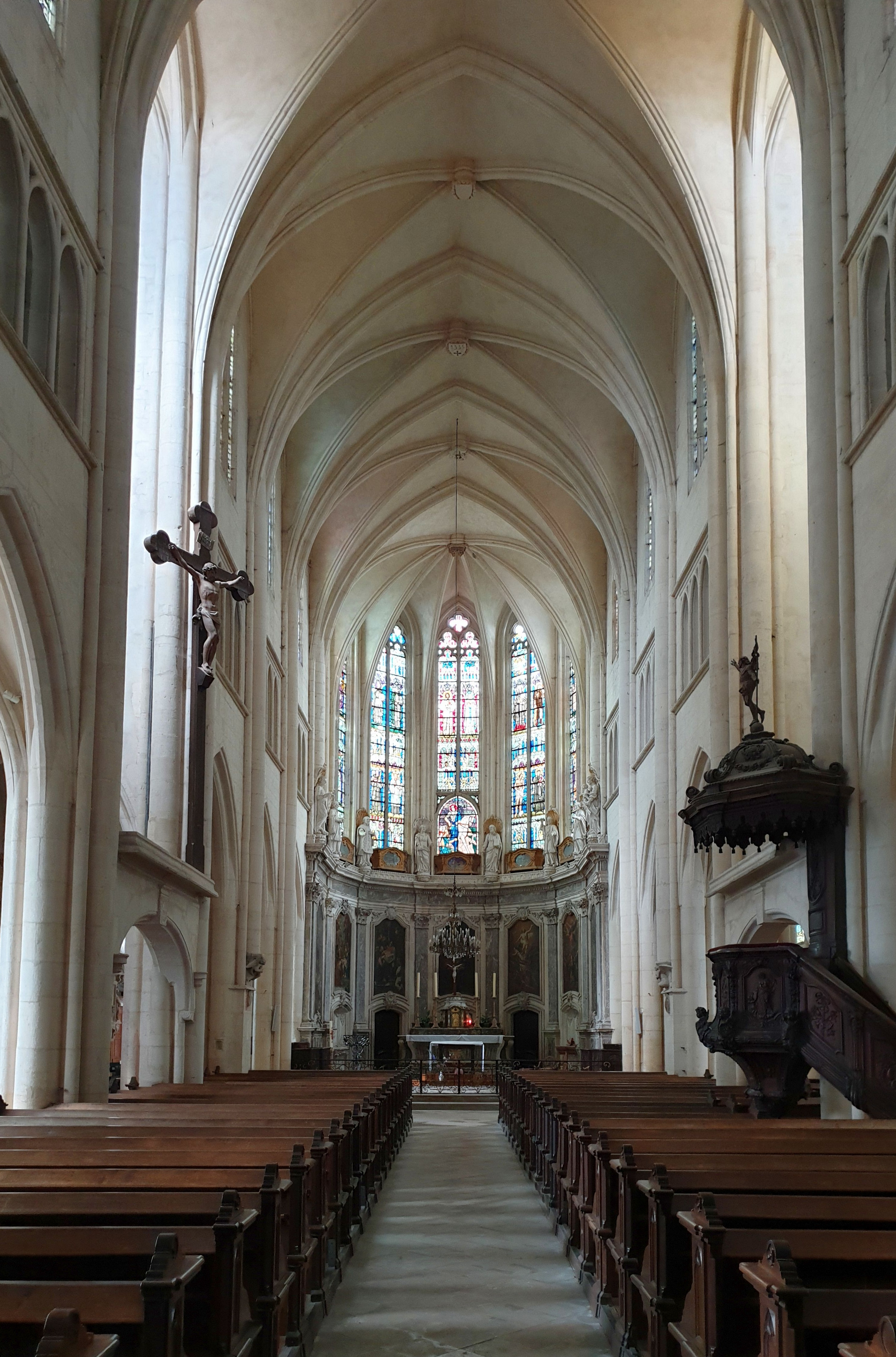 Saint-Martin de Pont-à-Mousson